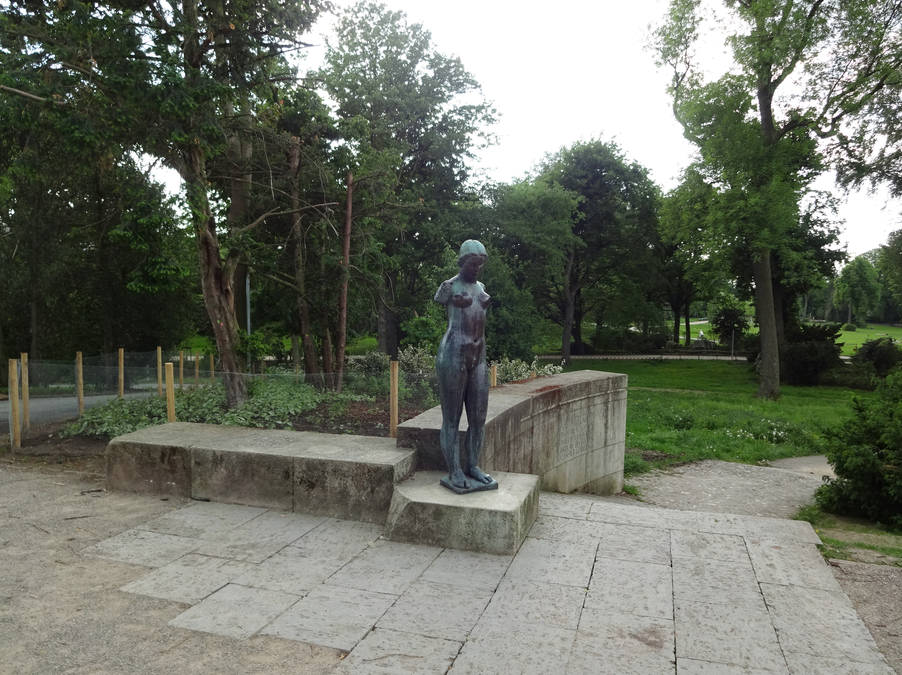 Napoleonsberg mit Harmonie von Aristide Maillol, Mai 2018